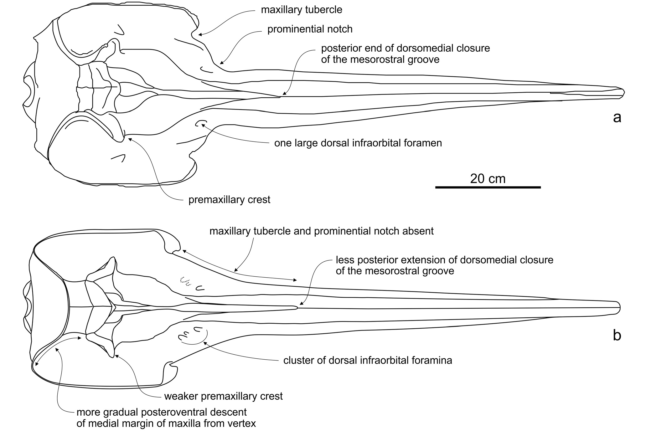 Comparison between the reconstructions of the skulls in dorsal view of: a) Messapicetus gregarius from Cerro Colorado (southern Peru); b) Messapicetus longirostris from Cisterna quarry (Lecce, southern Italy). Characters distinguishing the two species are indicated.